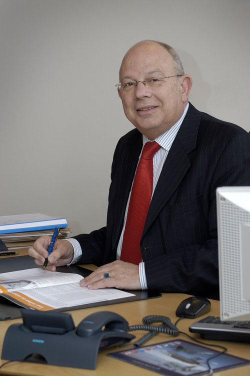 Portret Cees Waal tijdens zijn burgemeesterschap van de gemeente Delfzijl